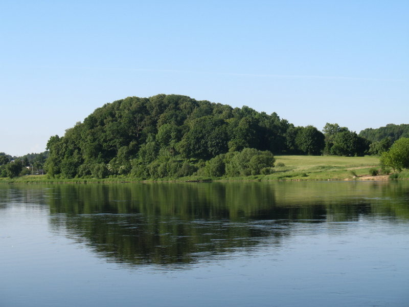 Nemunas, Jiesios piliakalnis (Napoleono kalnas).